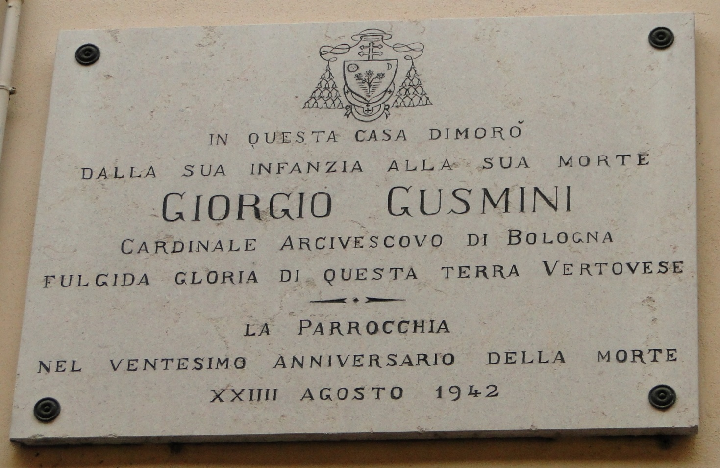 Targa Card. Gusmini. Vertova (BG). Italia